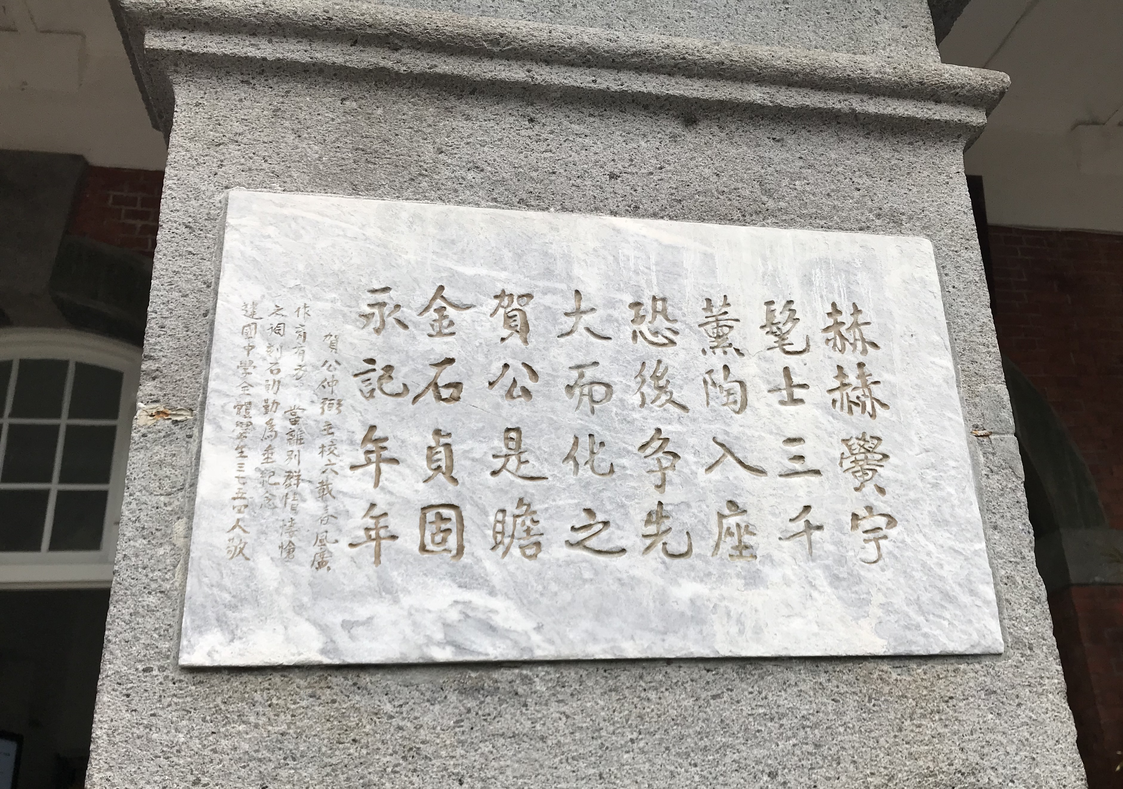 台北市立建國中學紅樓柱上記載1954年，賀翊新校長卸任時，接受學生歡送的場景「中華民國四十四年元月：赫赫黌宇，髦士三千，薰陶入座，恐後爭先，大而化之，賀公是瞻，金石貞固，永記年年。賀公仲弼，主校六載，春風廣作育有方，當離別，群情悽愴之詞，刻石勛勤為垂紀念。建國中學全體學生三七五四人敬勒。」